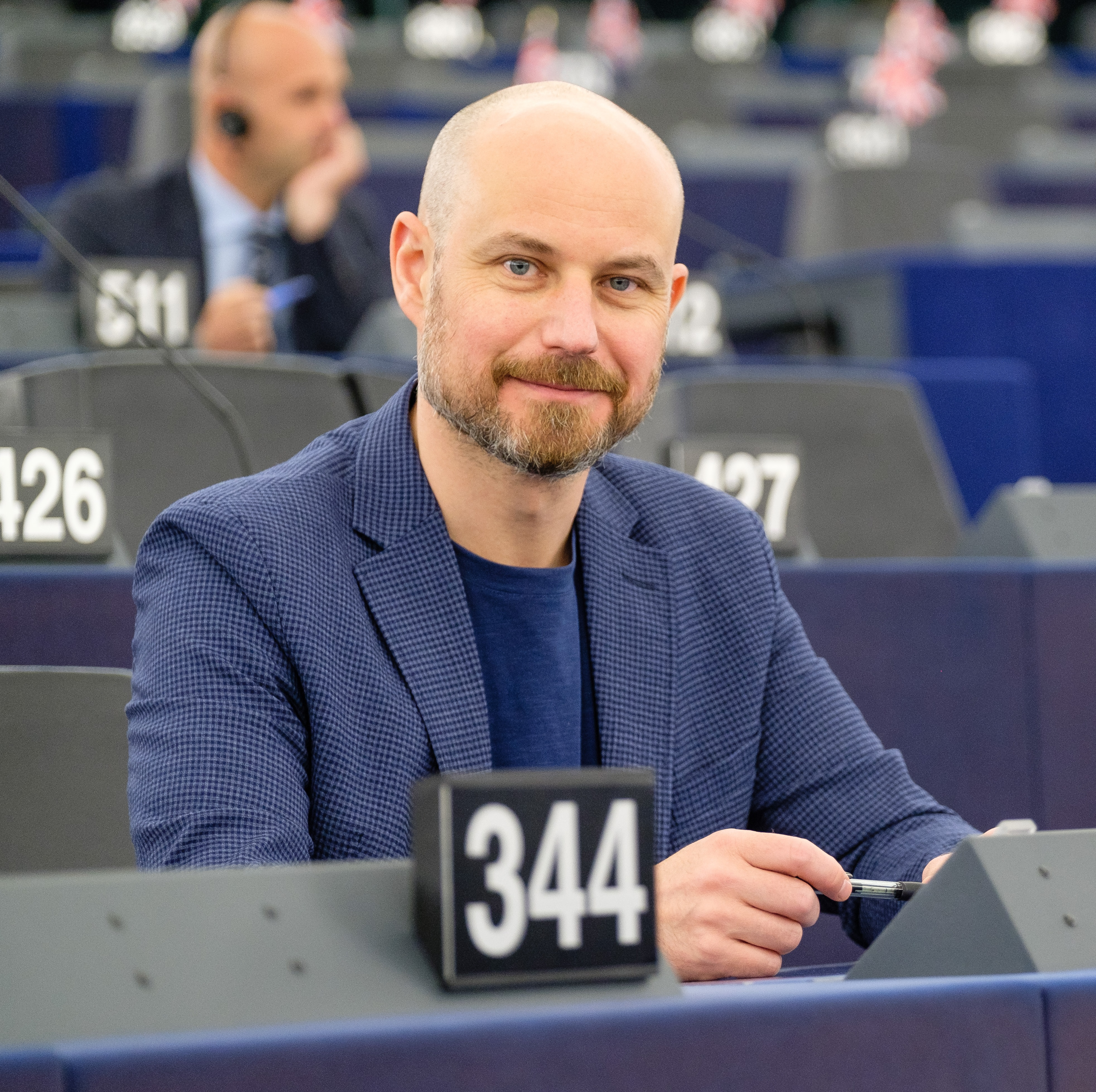 Oficiálna fotografia Vladimíra Bilčíka vyhotovená Európskym parlamentom v Európskom parlamente, s ktorou môže on a jeho kancelária voľne nakladať.